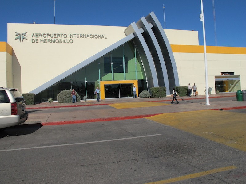 Aeropuerto de Hermosillo